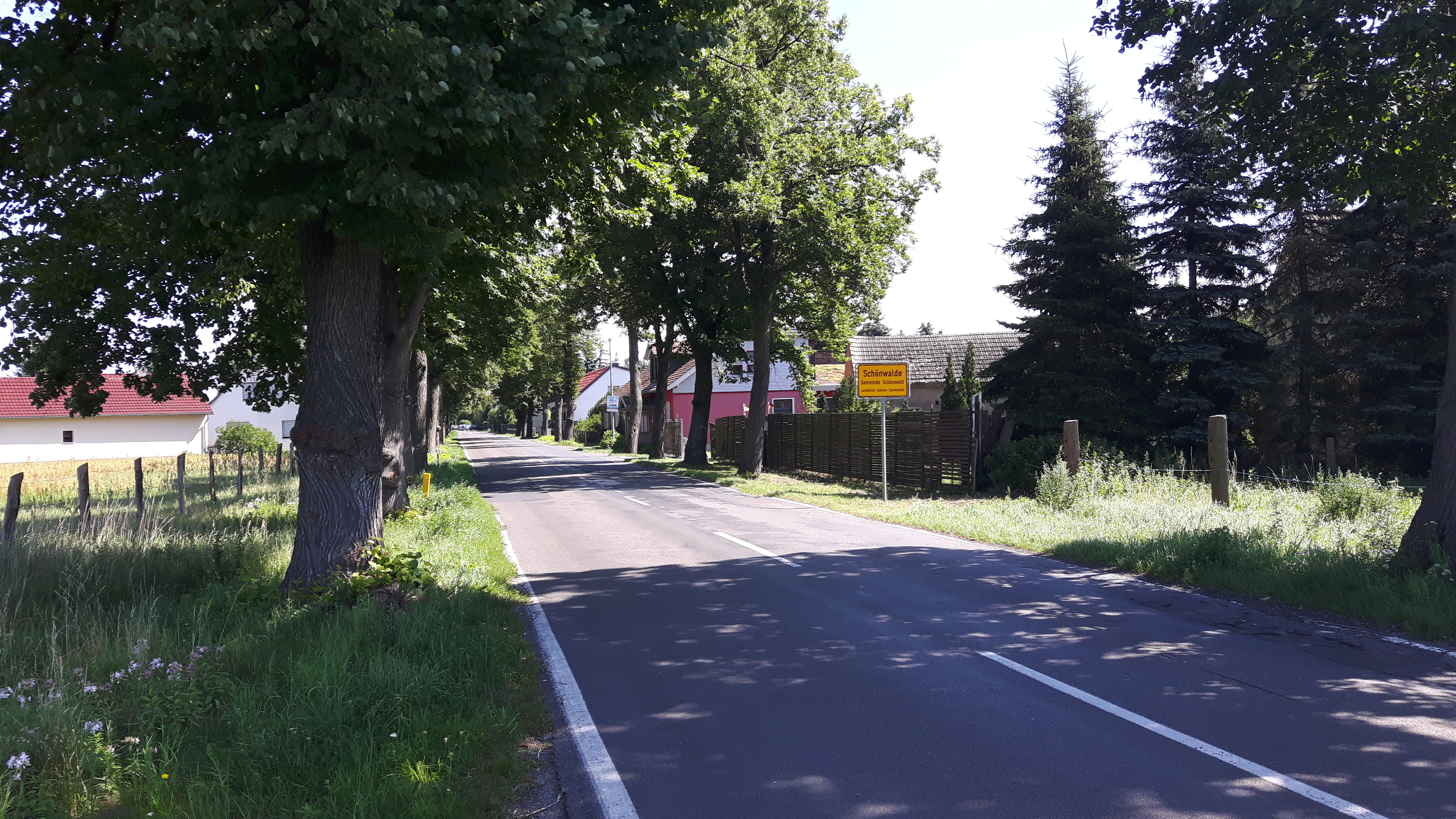 Ortseingang des Ortsteils Schönwalde